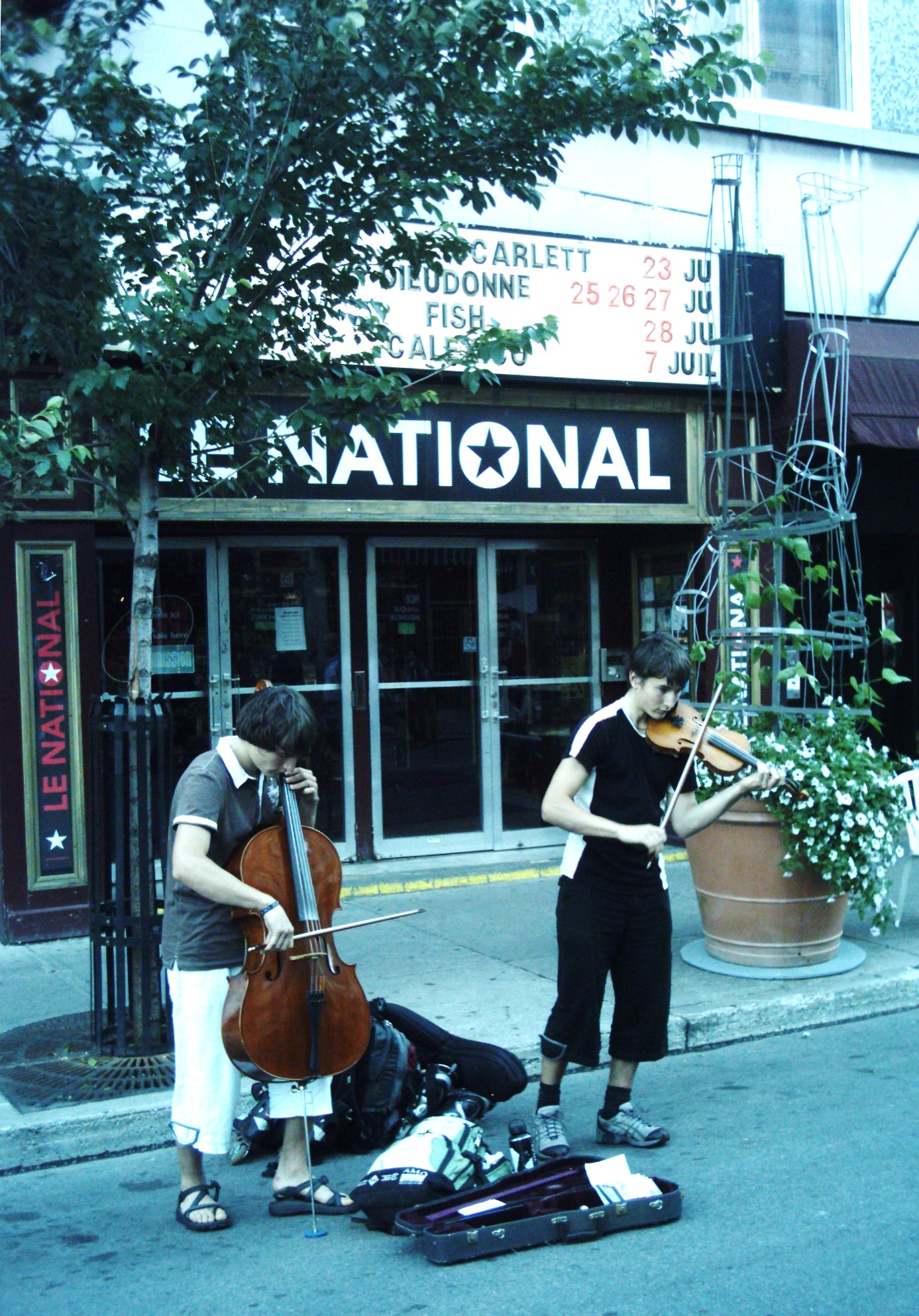 Le Théâtre National situé sur la rue Sainte-Catherine à Montréal, à l'intersection de la rue Beaudry.